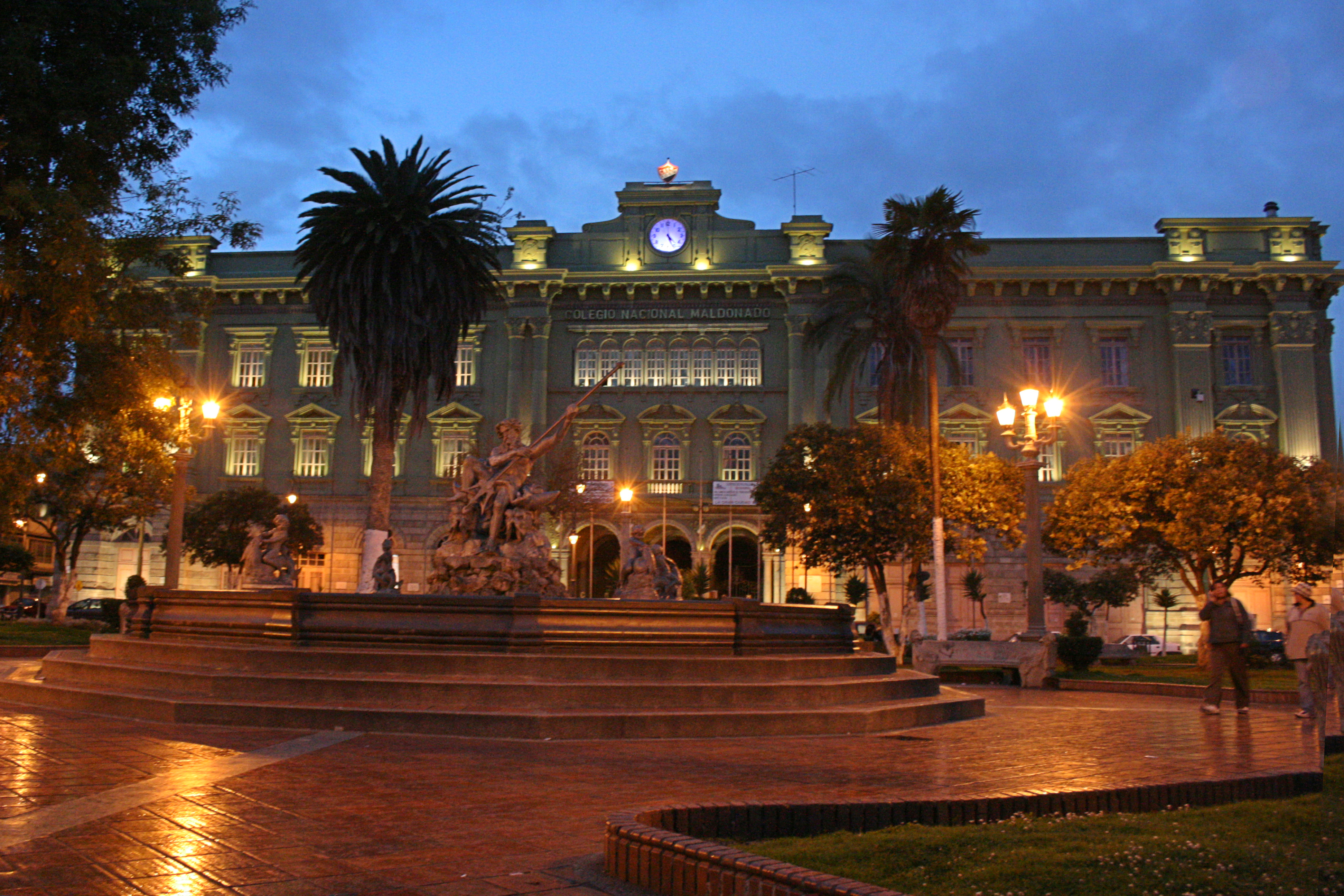 Colegio Maldonado en Riobamba.